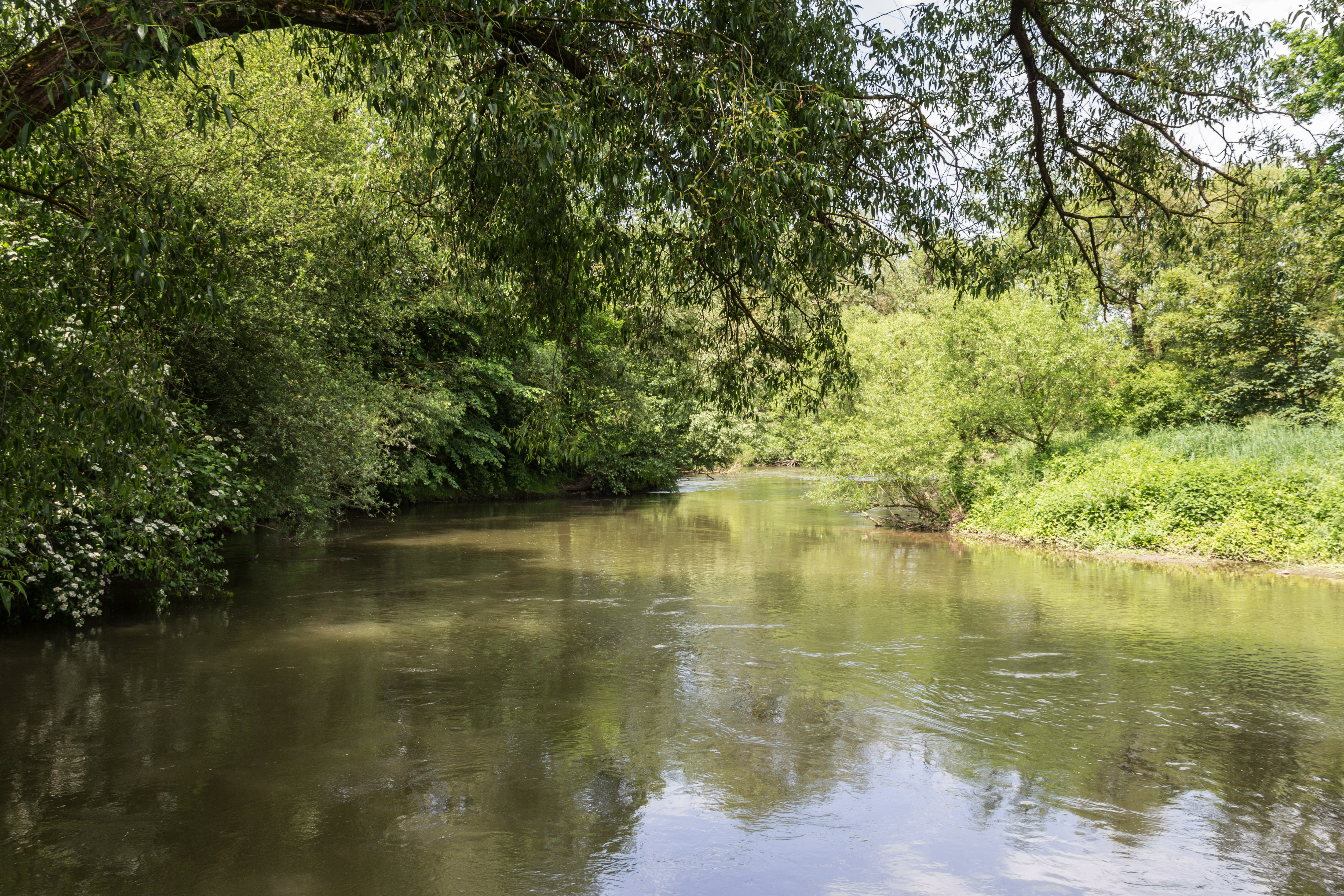 Rednitztal zwischen Katzwang und Wolkersdorf, LSG Rednitztal - Süd, FFH-Gebiet Rednitztal in Nürnberg